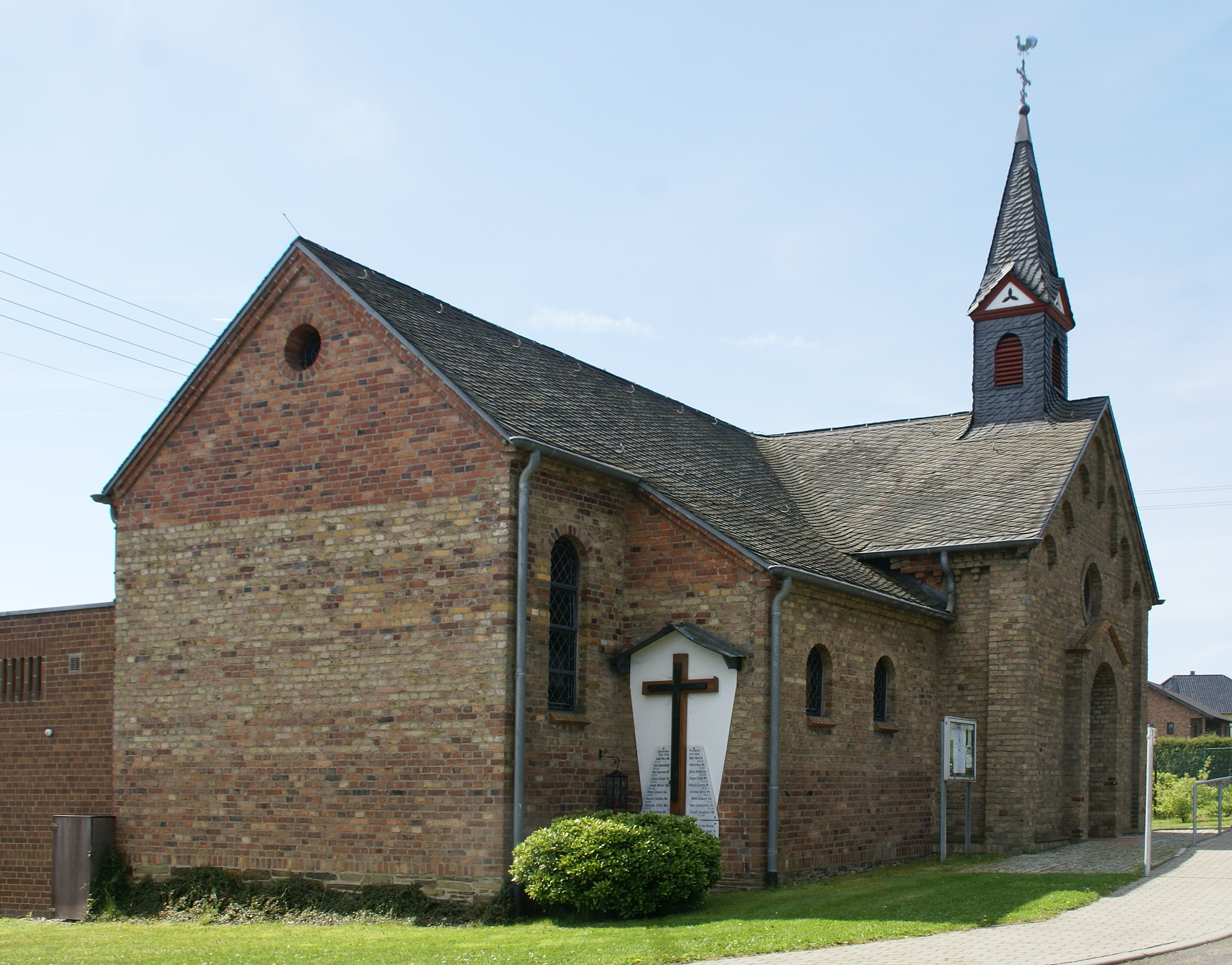 Marienkapelle (Unsere liebe Frau von der Immerwährenden Hilfe) in Wellesberg